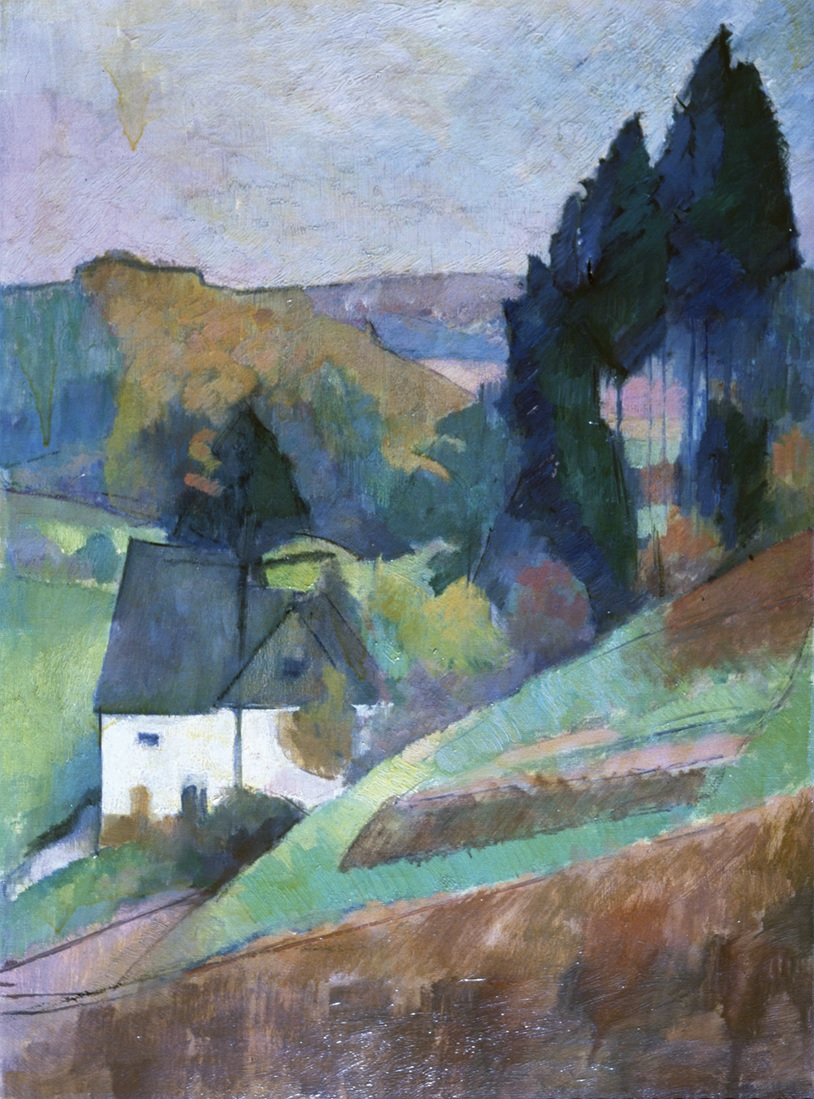 Fotografie des Bildes „Hälvertal mit der Schule Heesfeld an der Heesfelder Mühle“, Öl auf Leinwand von Franz Nölken